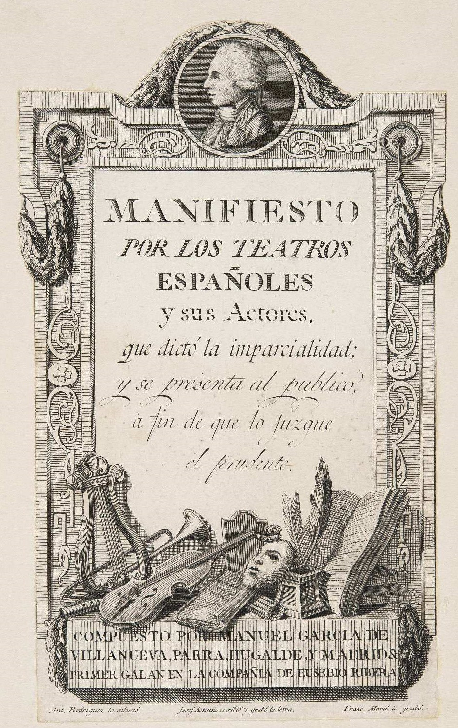 MANIFIESTO / POR LOS TEATROS / ESPAÑOLES / y sus Actores, / que dictó la imparcialidad; / y se presenta al publico, / a fin de que lo juzgue / el prudente / COMPUESTO POR MANUEL GARCIA DE / VILLANUEVA, PARRA, HUGALDE, Y MADRID & / PRIMER GALAN EN LA COMPAÑÍA DE EUSEBIO RIBERA. Ant. Rodriguez lo dibuxó ; Josef Assensio escribió y grabó la letra ; Franc. Martí lo grabó. Madrid, 1788?, Viuda de Ibarra.